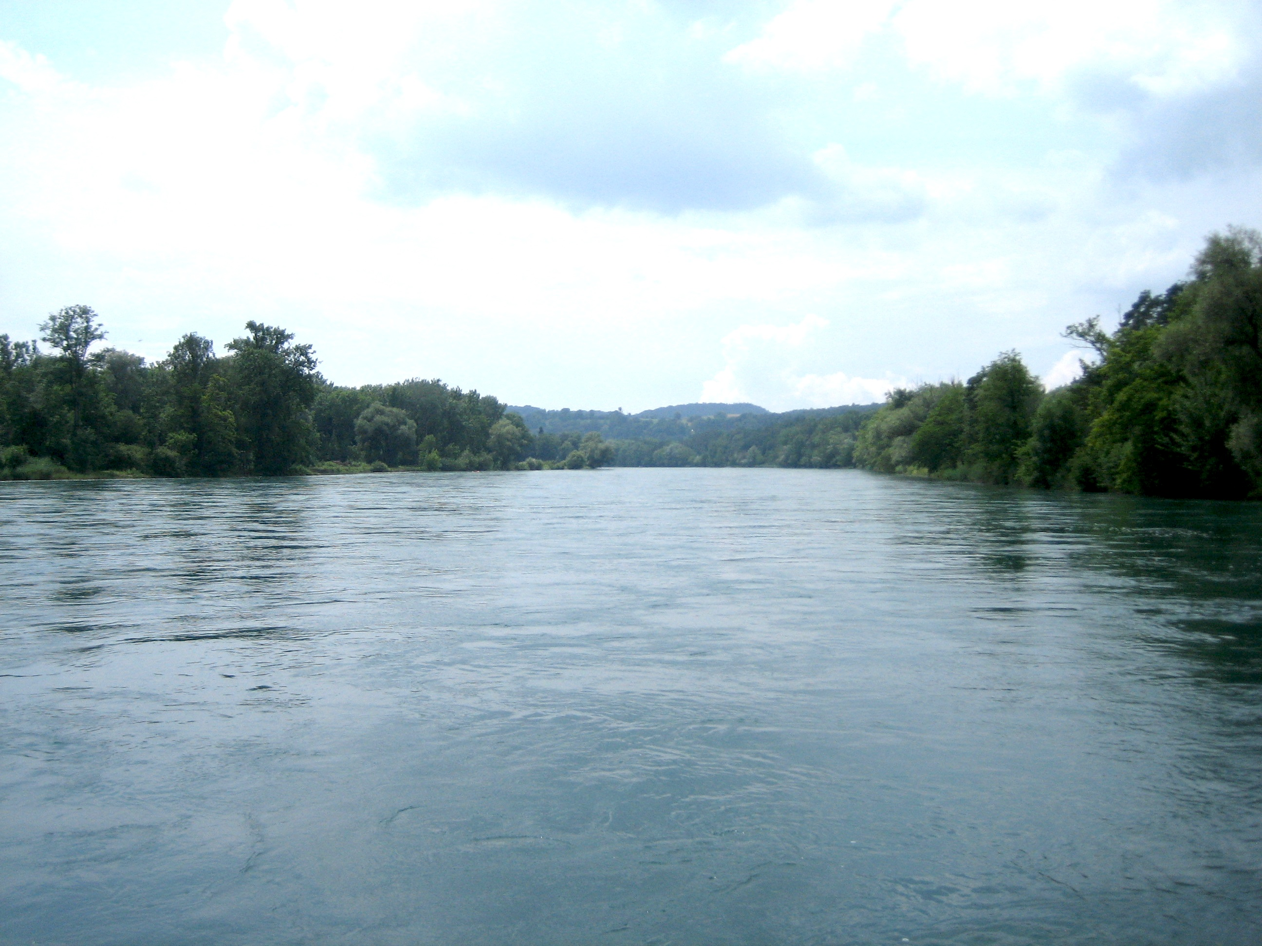 Rhein bei Ellikon am Rhein